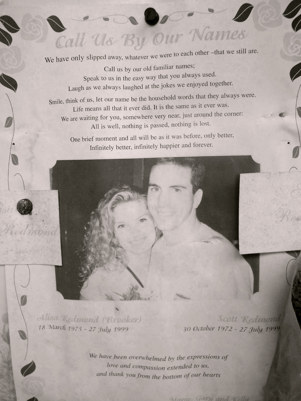 Gedenktafel zum Saxetbachunglück 1999 in Wilderswil